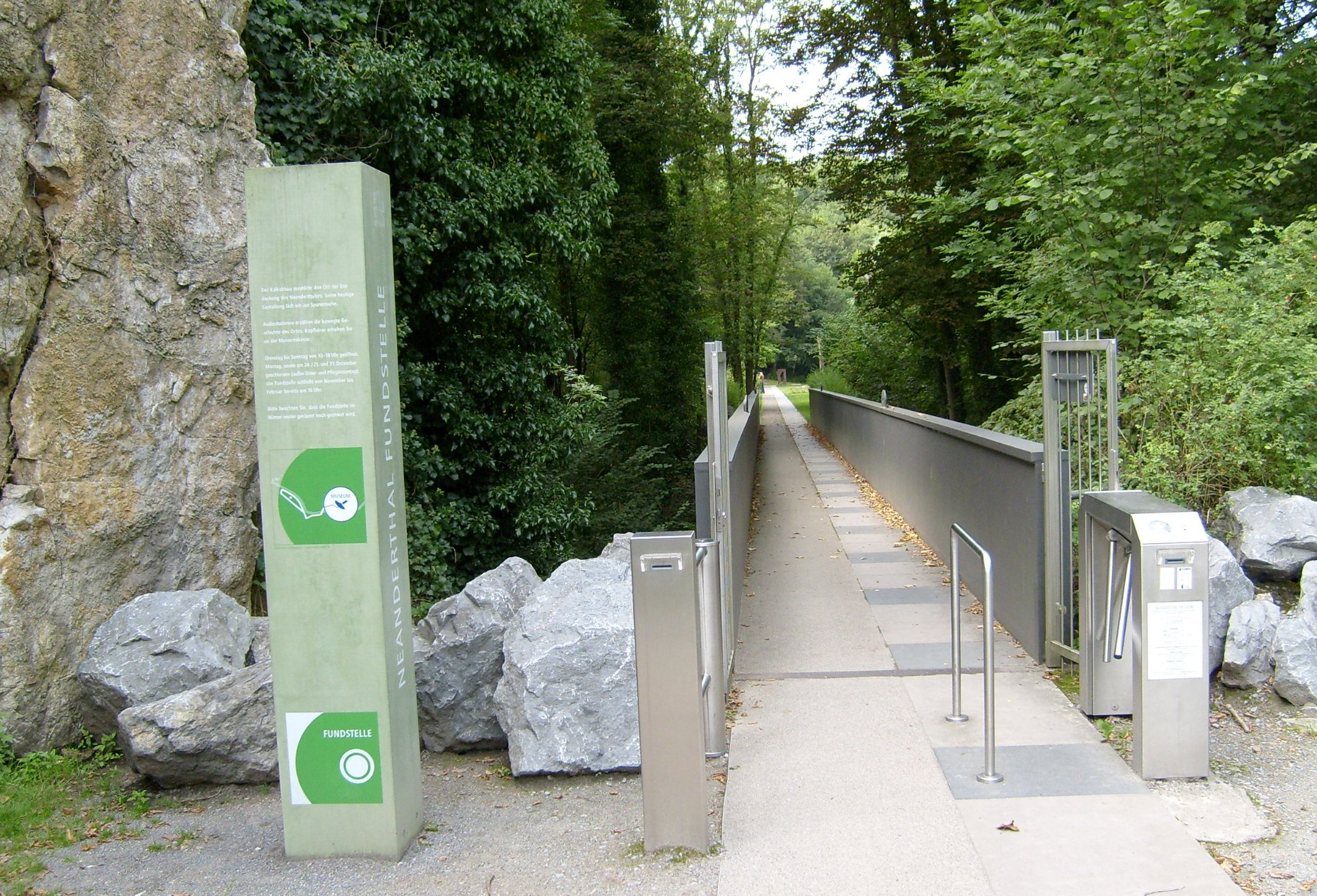 Stele „Neanderthal-Fundstelle“ und Zugang über die Düsselbrücke zum Fundort des Neandertalers in Erkrath; links am Bildrand der Rabenstein